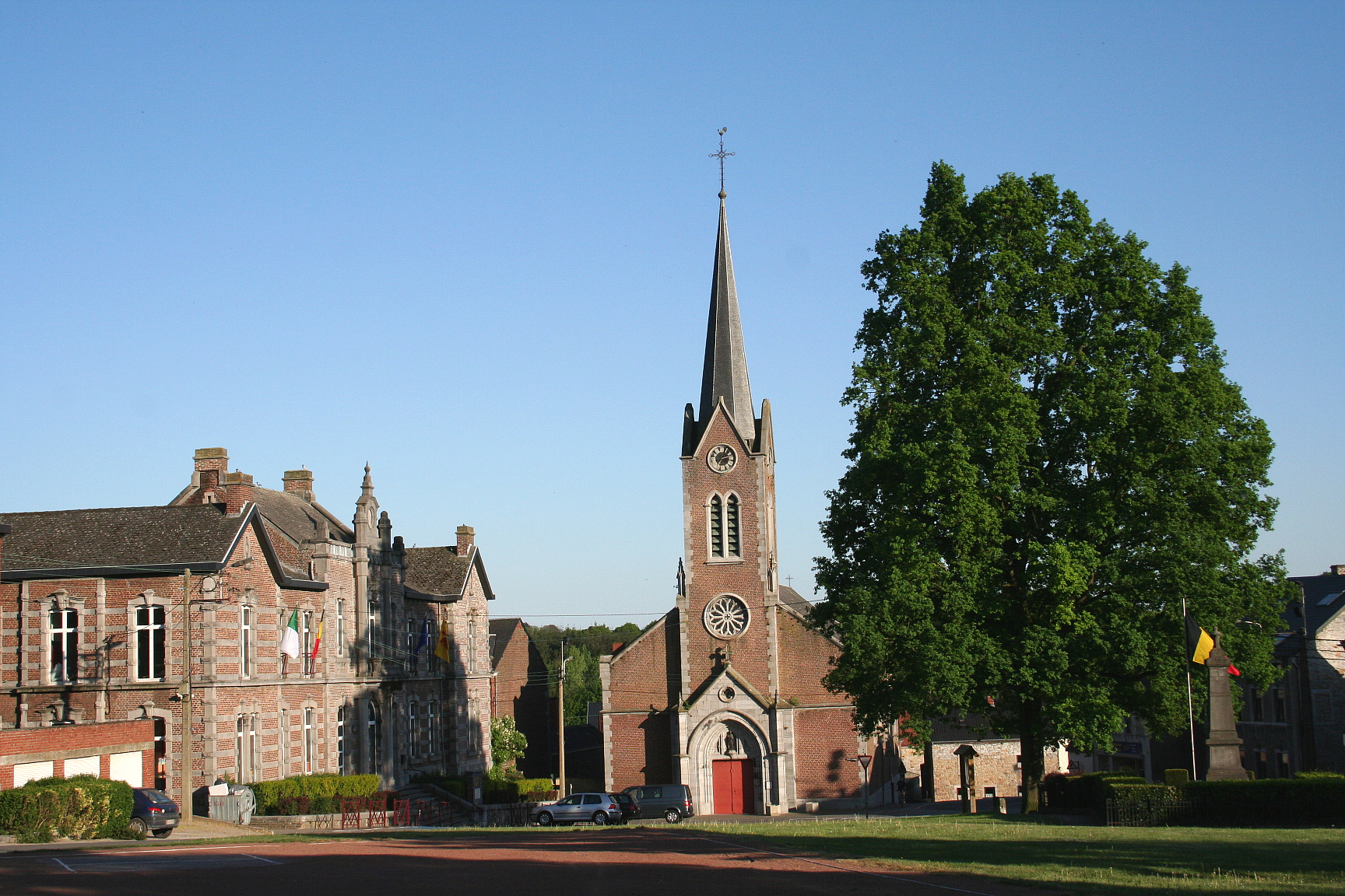 Gougnies (Belgique), le quartier de l'église Saint-Remi.